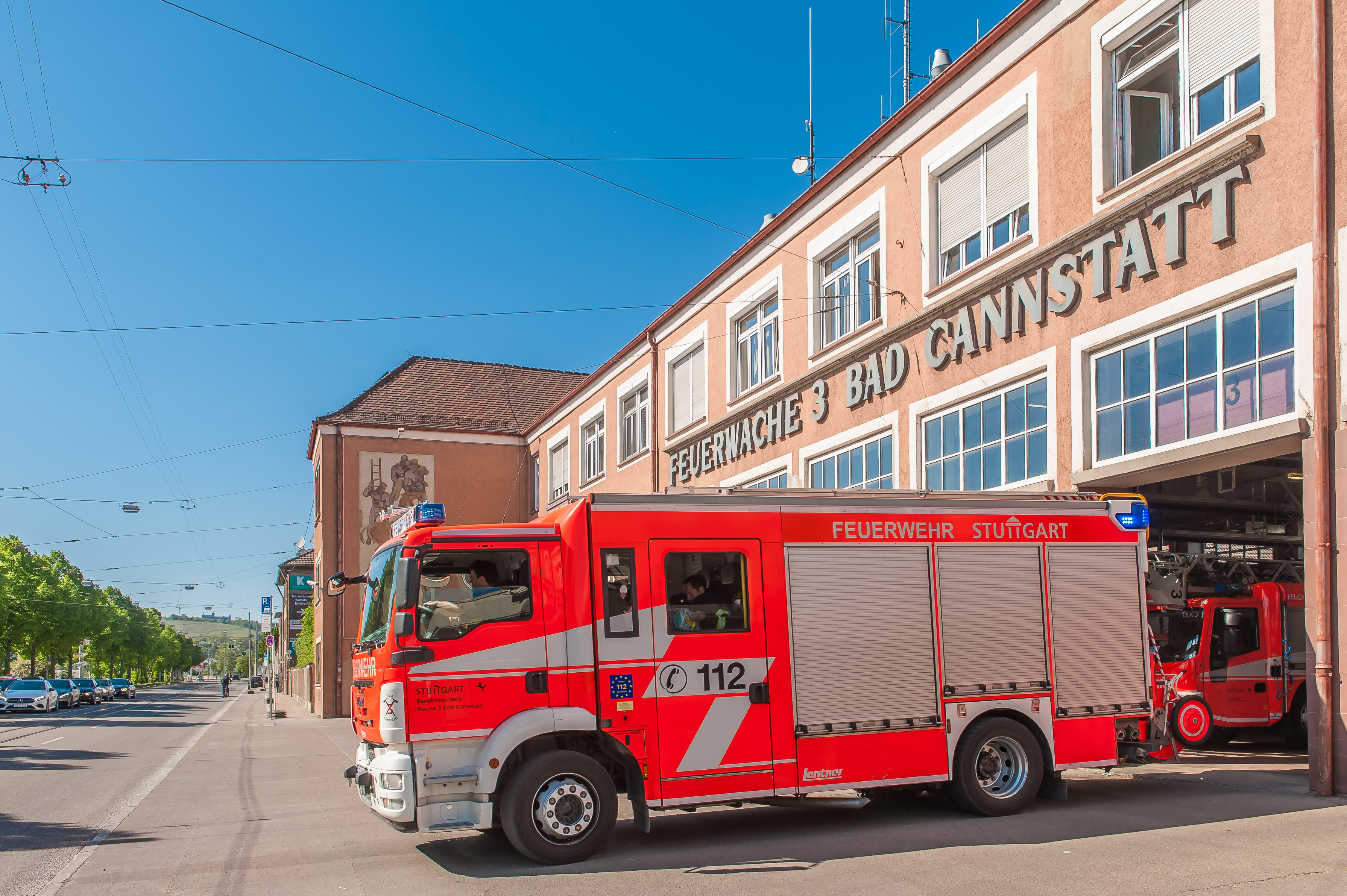 Feuerwache Stuttgart - Bad Cannstatt mit ausrückendem Löschfahrzeug